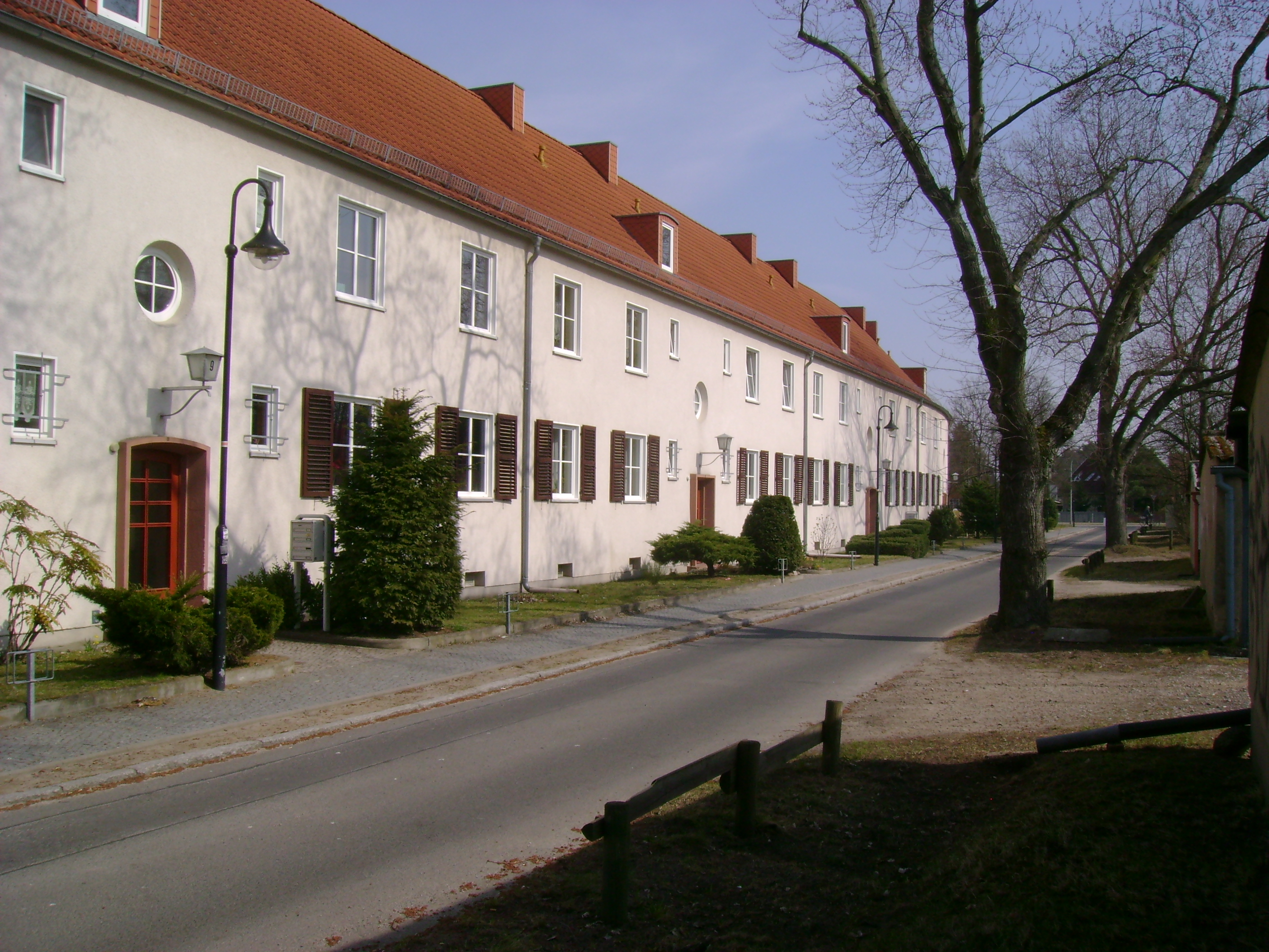 Friedrich Engels Straße in der Wohnsiedlung "Weiße Stadt" in Oranienburg. Als die Siedlung zwischen 1937 und 1938 als Werksiedlung der Heinkel-Werke entstand, hieß die Straße noch Boelckestraße.